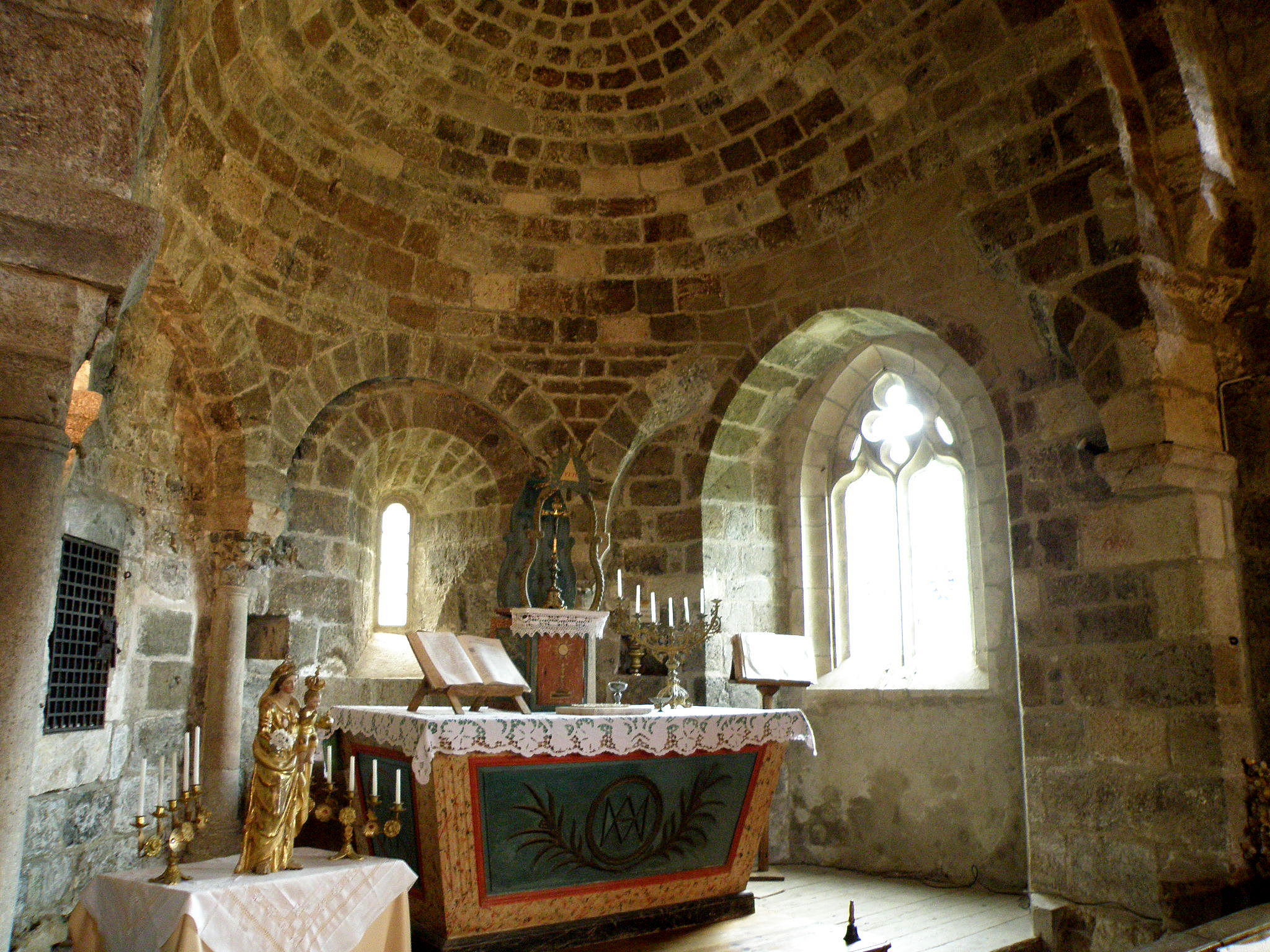 Bourg médiéval de Chalencon, appartenant à la comm. de Saint-André-de-Chalencon, dép. de la Haute-Loire, France (région Auvergne). Chapelle du XIe s., choeur. Arcades percées d'un jour en archère (gauche) et d'une fenêtre gothique du XVe (droite).